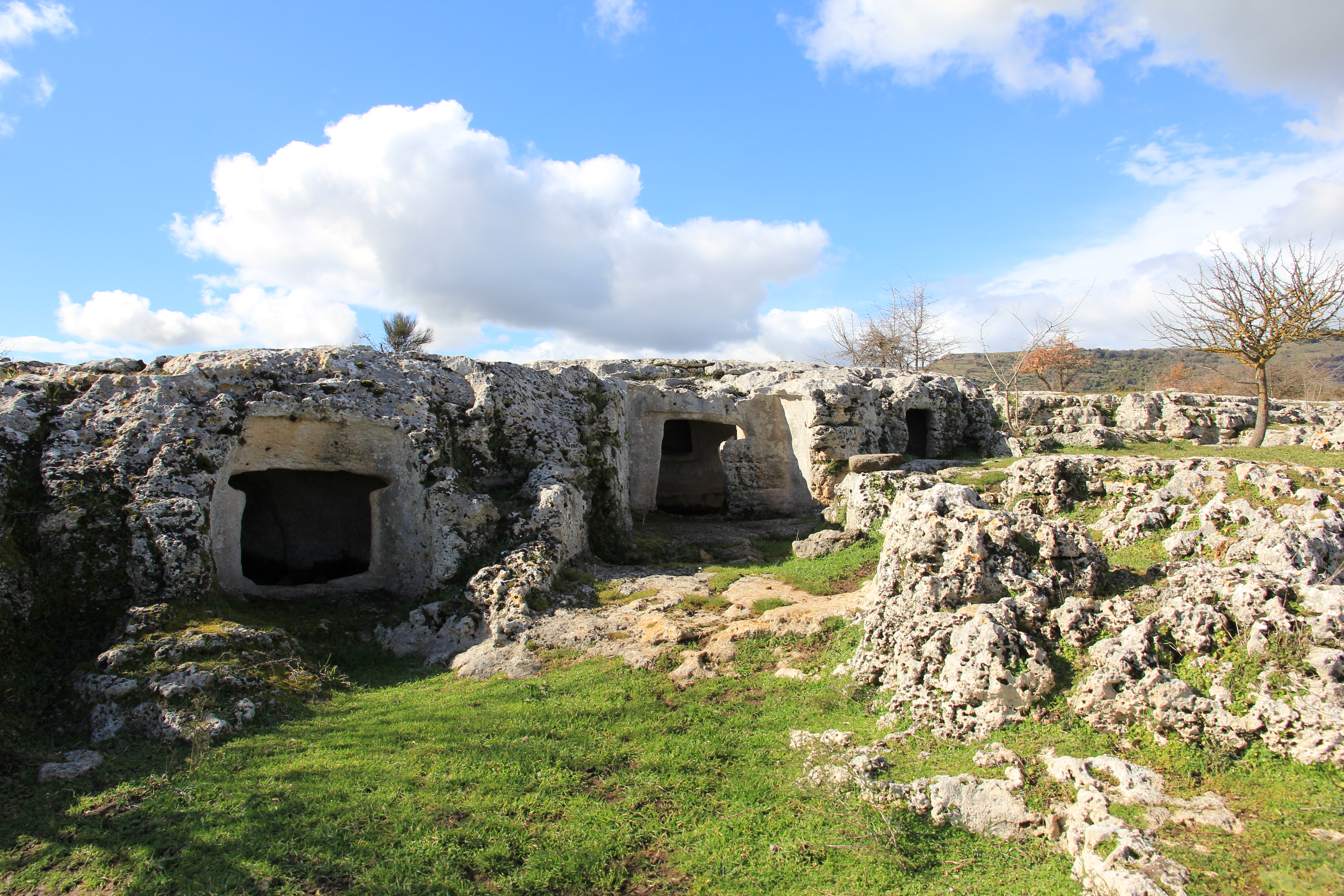 Cheremule - Necropoli di Moseddu